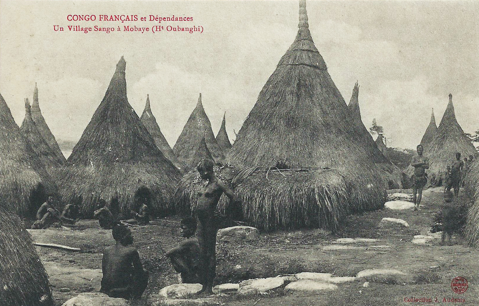 Un village Sango à Mobaye (Haut Oubanghi). Collection J. Audema. Phot. A.B. & Cie, Nancy [Albert Bergeret] Congo Français et dépendances